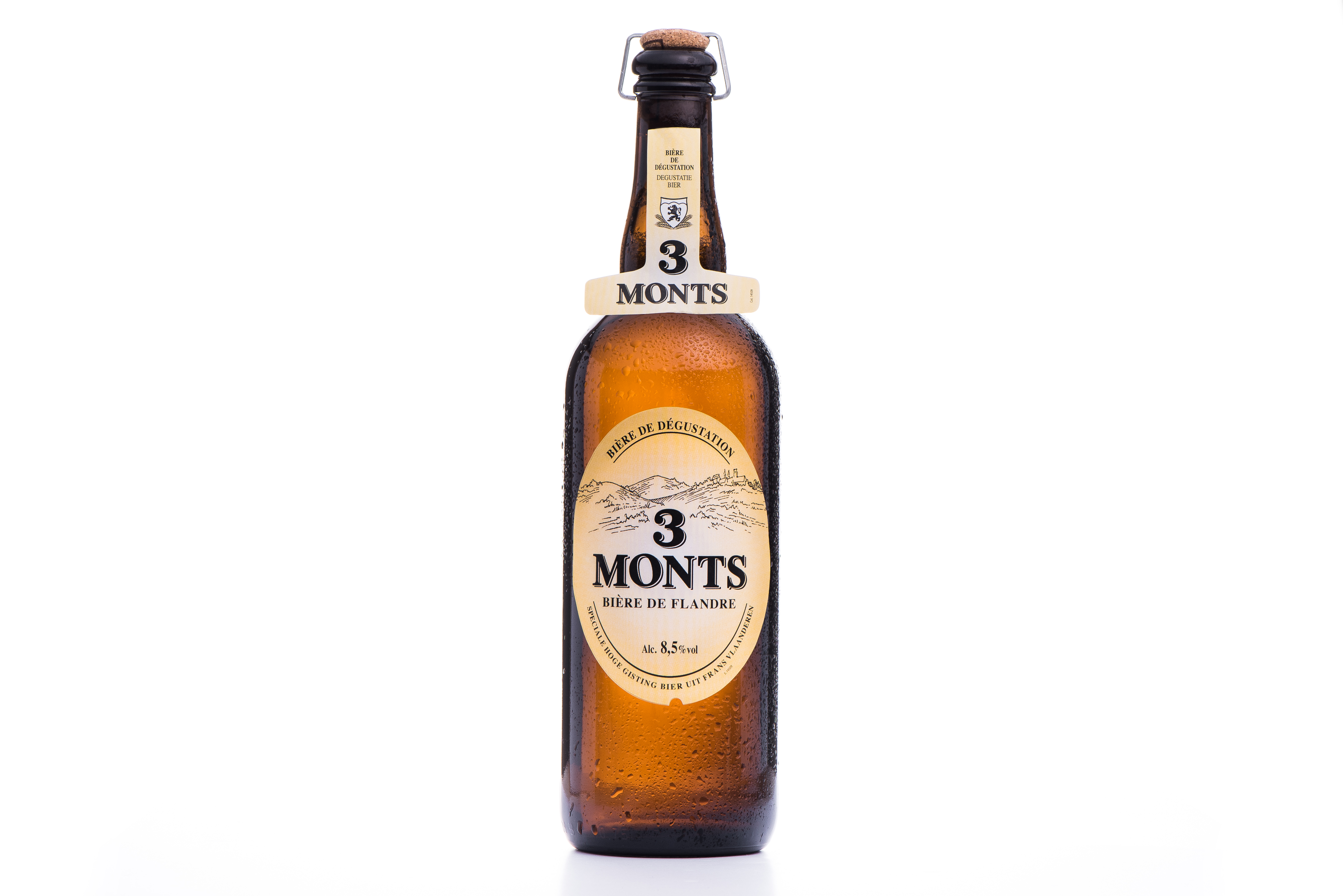 La bière 3 MONTS puise son caractère au coeur du pays des Trois Monts, points culminants de la Flandre française. Elaborées à partir de houblons majoritairement locaux et brassées avec autant de passion que de simplicité, nos bières évoquent la richesse de la terre et la convivialité légendaire flamande.